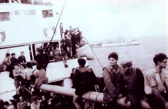 אוניית המעפילים "כנסת ישראל" הביאה ארצה מעפילים. בנובמבר 1946 האניה יצאה מיוגוסלביה ועל סיפונה קבוצה גדולה של ניצולי שואה מהונגריה, פולניה ורומניה. לפני הגיעה לחיפה תפסו אותה הבריטים ושלחו אותה לקפריסין.